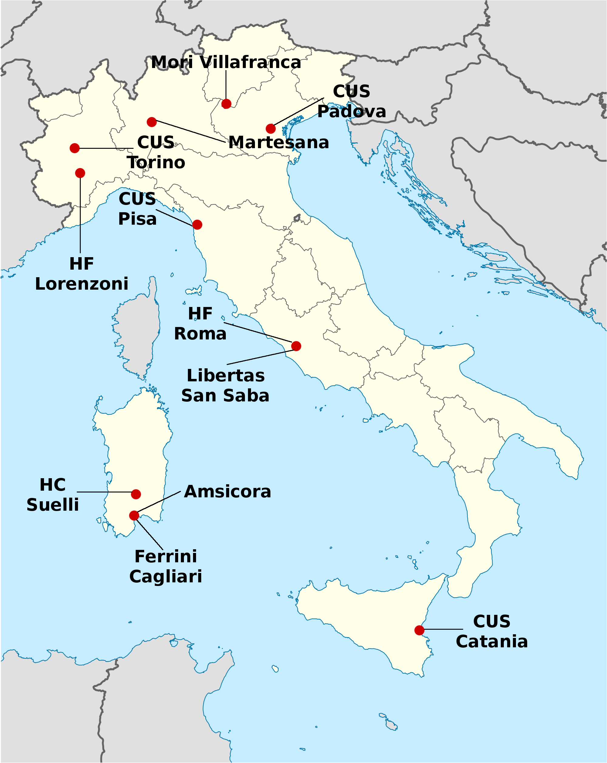 Localizzazione geografica delle squadre partecipanti al torneo di hockey femminile di serie A1 2009-2010